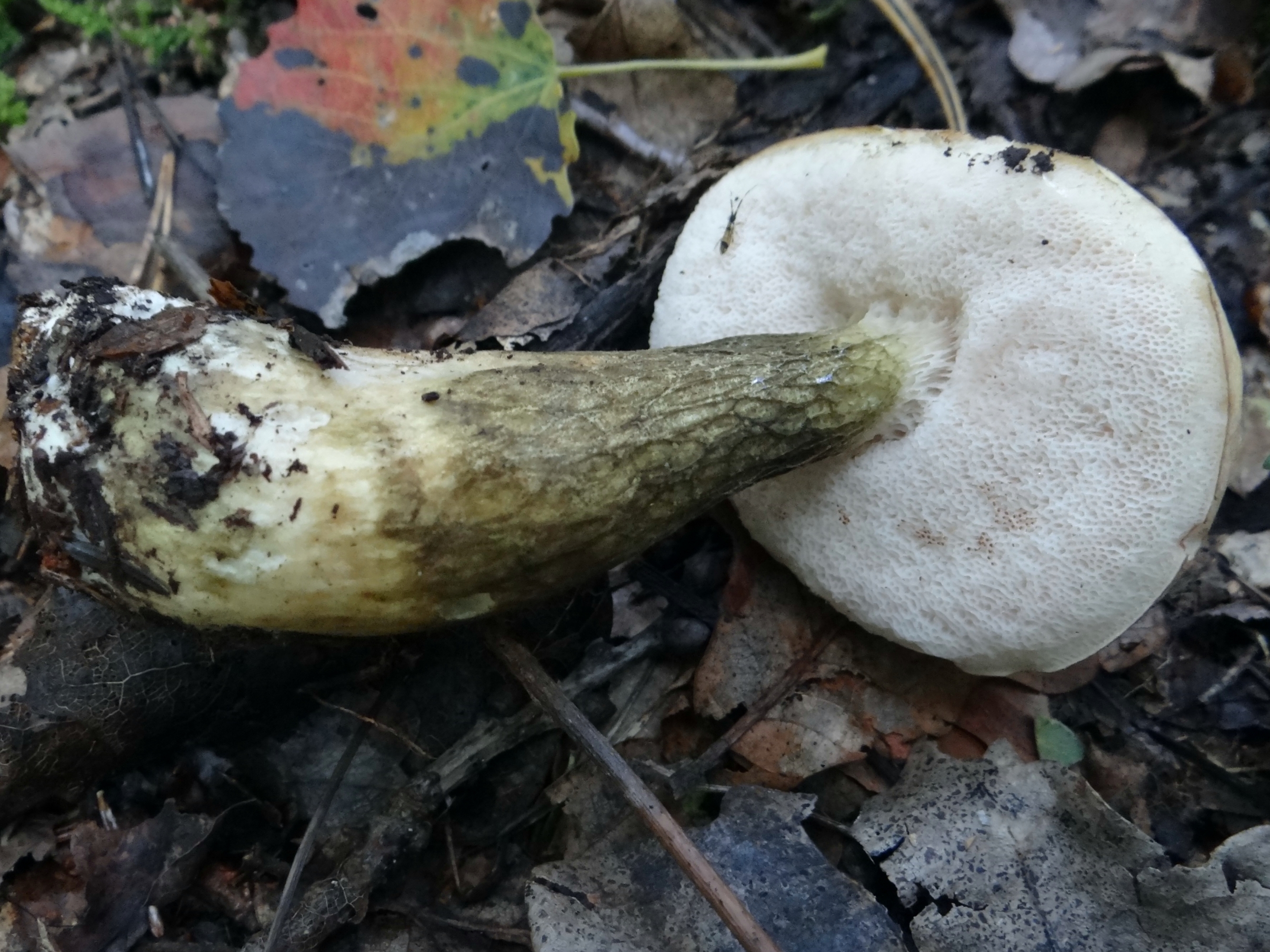 Tylopilus felleus (location: Poland, Kamionna w województwie małopolskim)